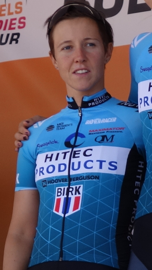 Marta Tagliaferro (Hitec) bij de start van de eerste etappe van Stramproy naar Weert in de Boels Ladies Tour 2019